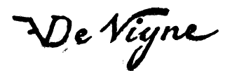 Autographe de Félix de Vigne